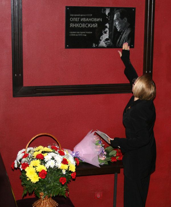 Актриса Инна Чурикова возлагает цветы к мемориальной доске Олега Янковского в Саратовском академическом театре драмы